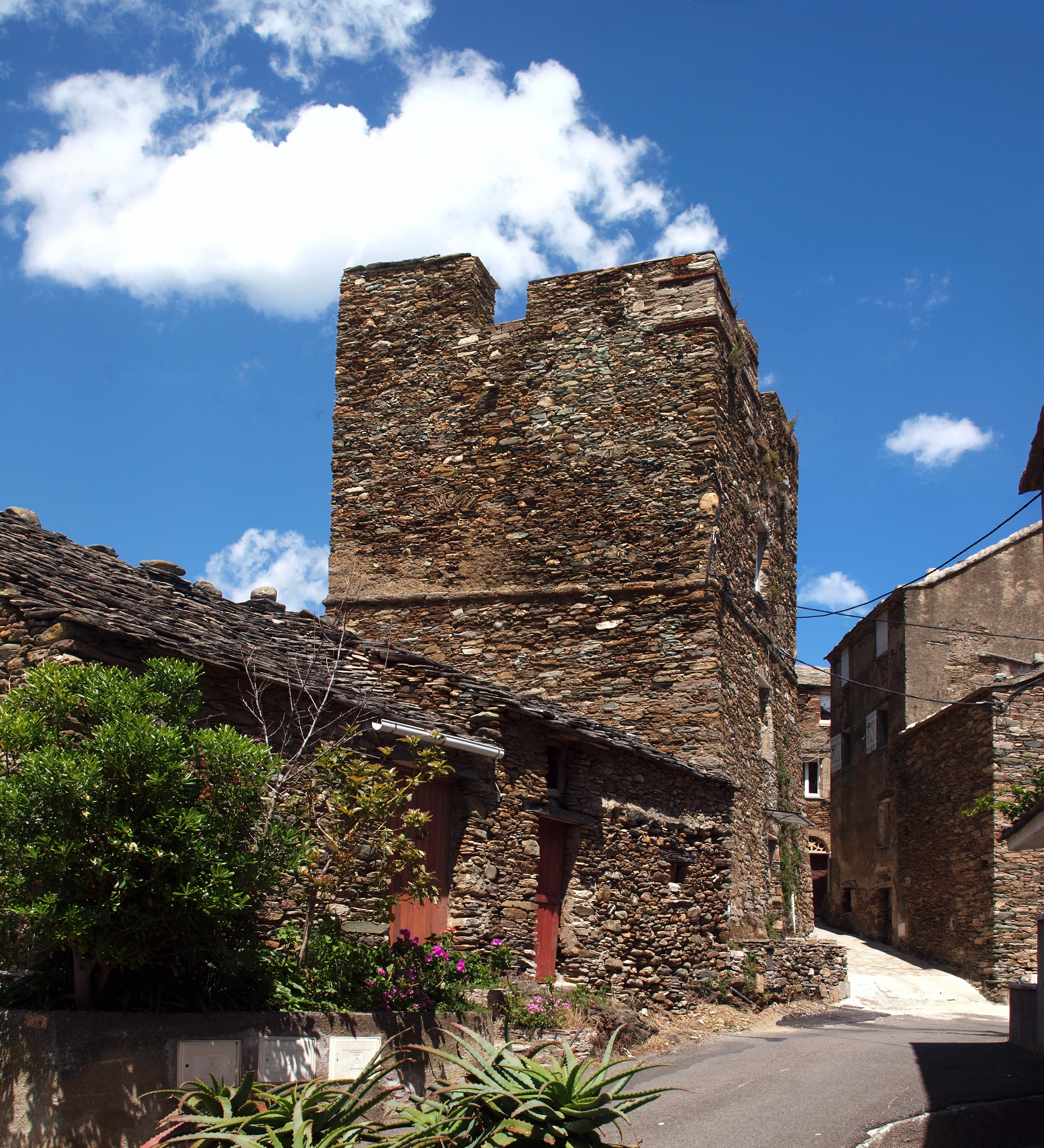 Sisco, Cap Corse (Corse) - Maison-tour carrée dite « pisane » de Crosciano